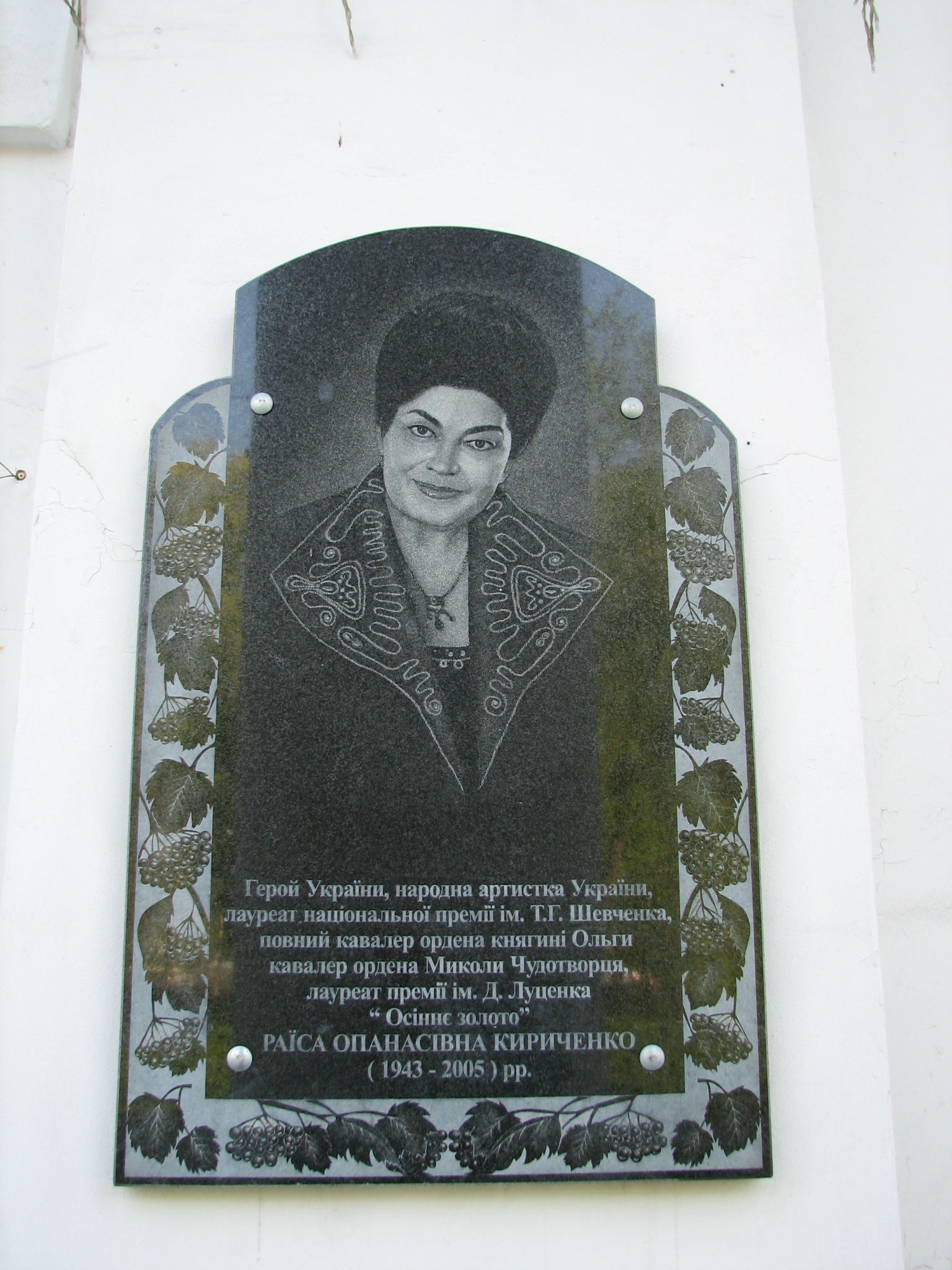 Раїса Опанасівнa Кириченко 1943-2005